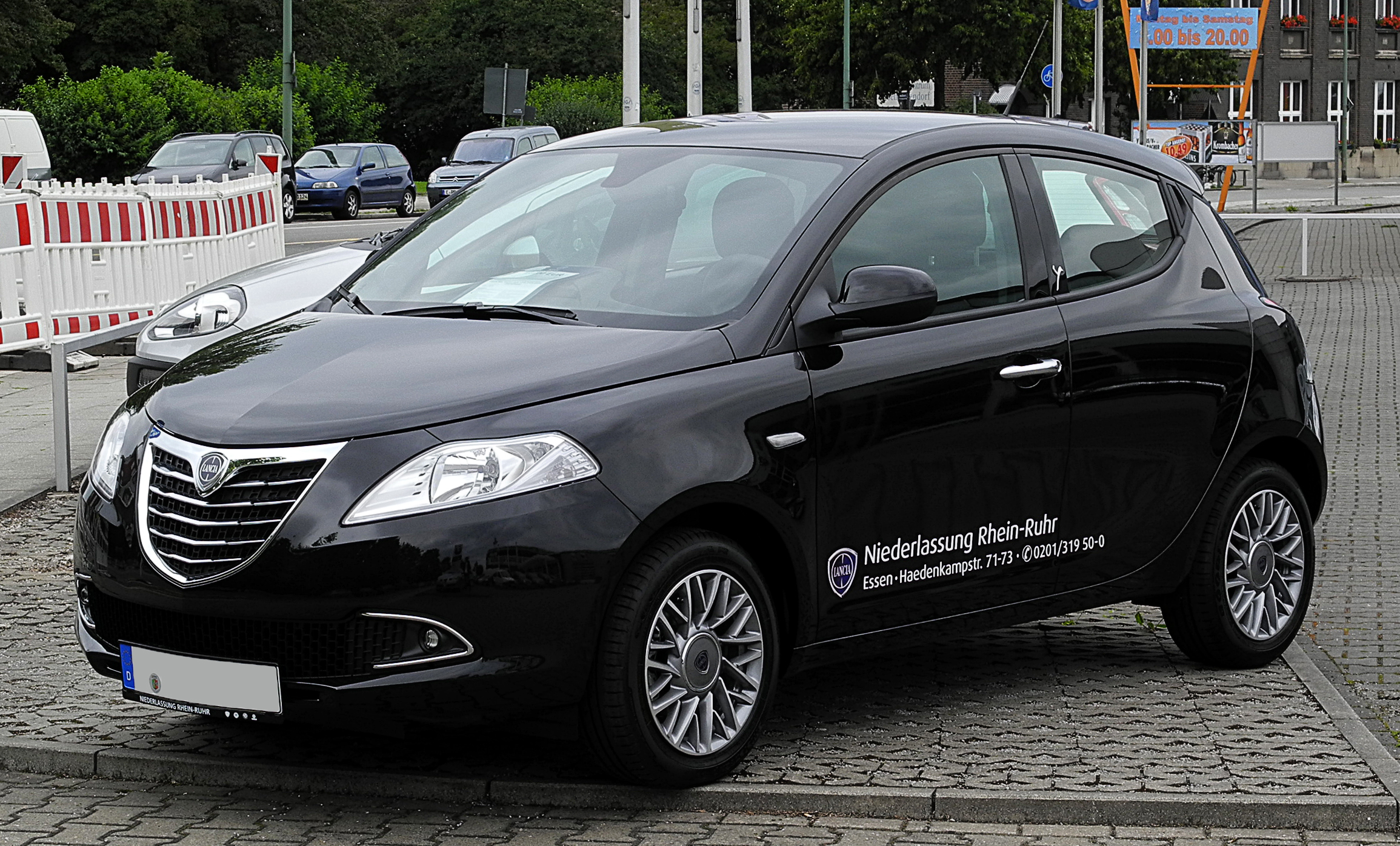 Lancia Ypsilon 1.2 8V Gold (II)